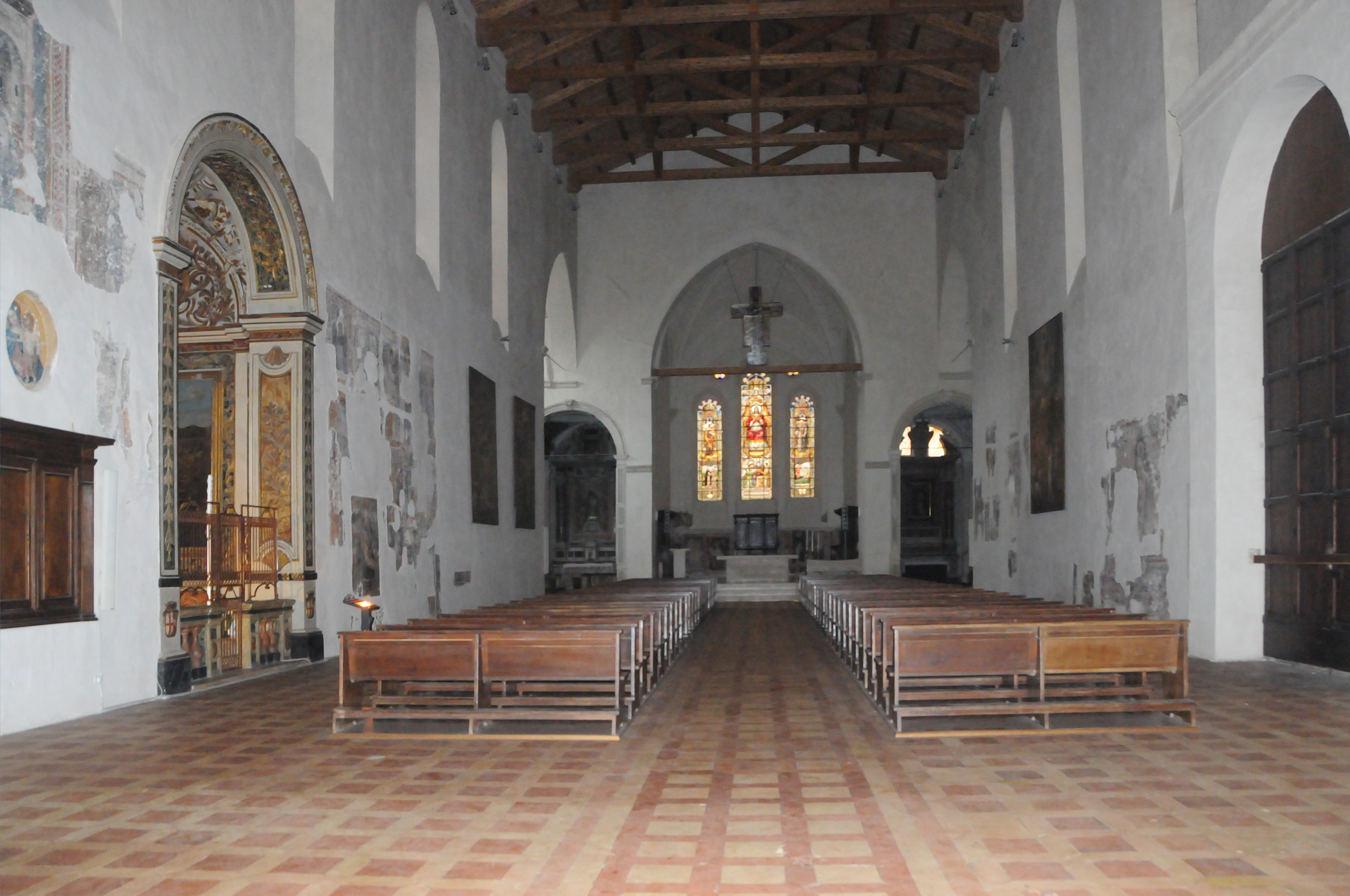 San Domenico (Spoleto)